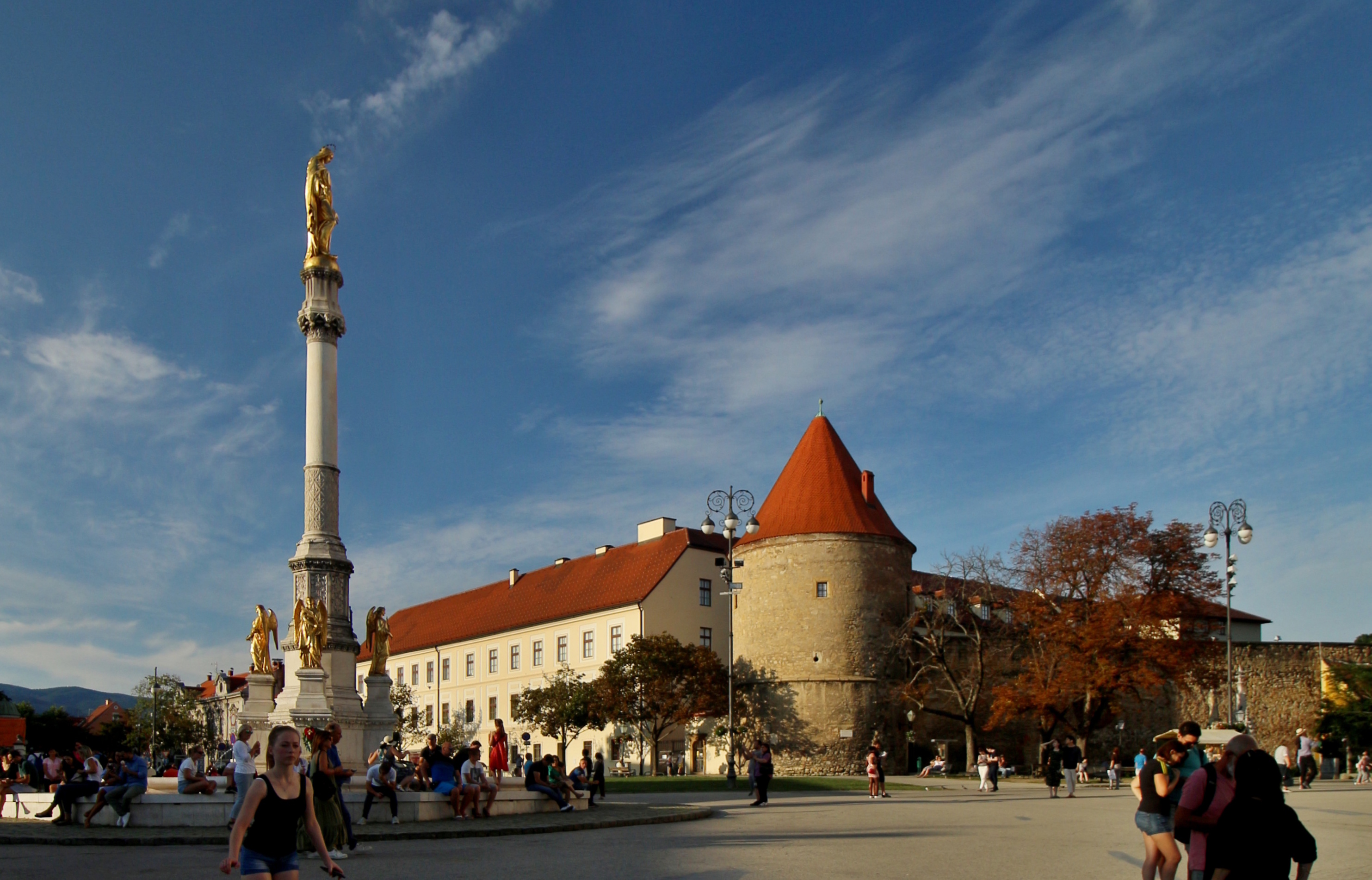 Záhřeb, Kapitol, katedrála a okolí